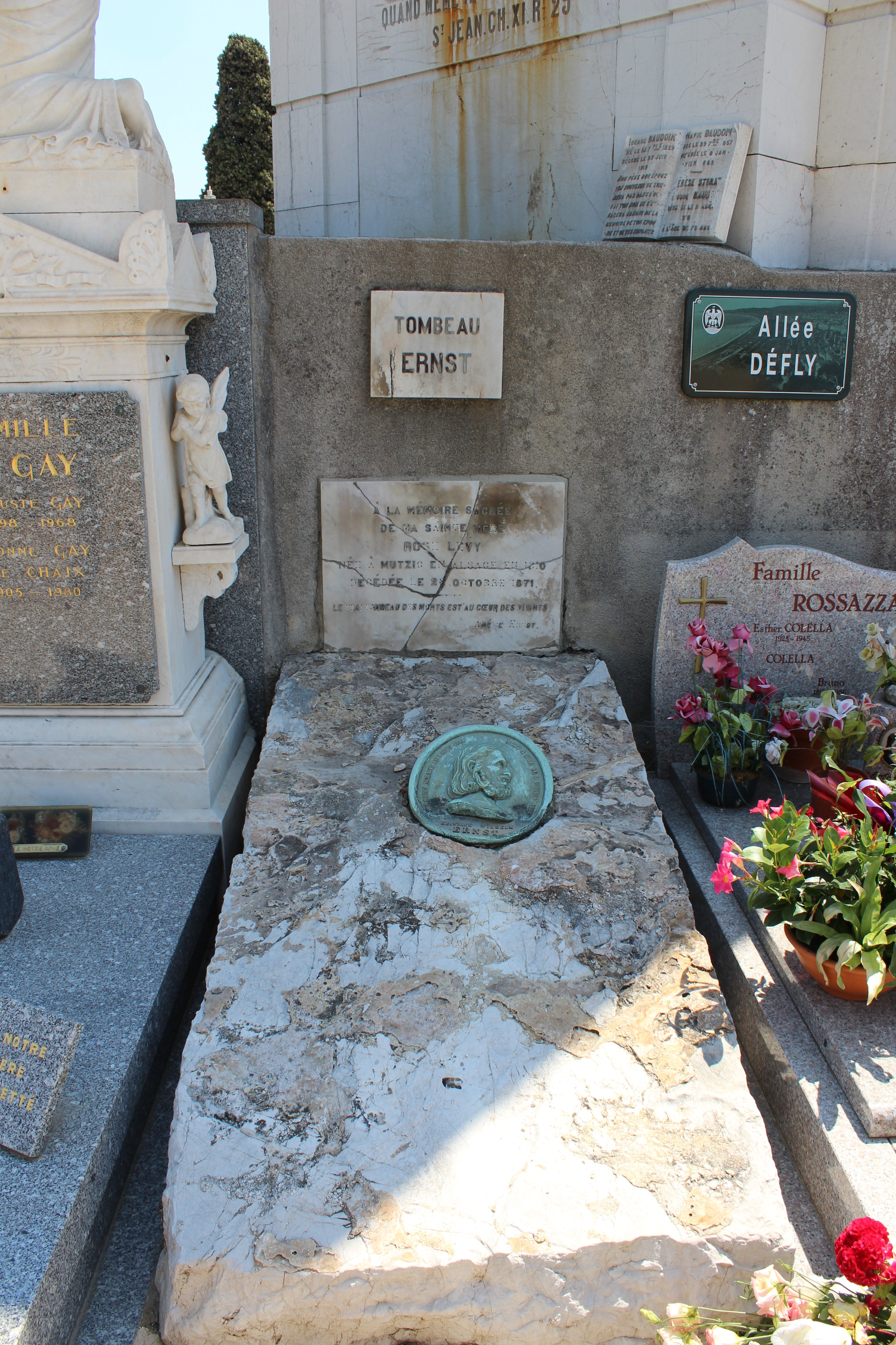 Gruft Heinrich Wilhelm Ernst auf dem Cimetière du château in Nizza 2013